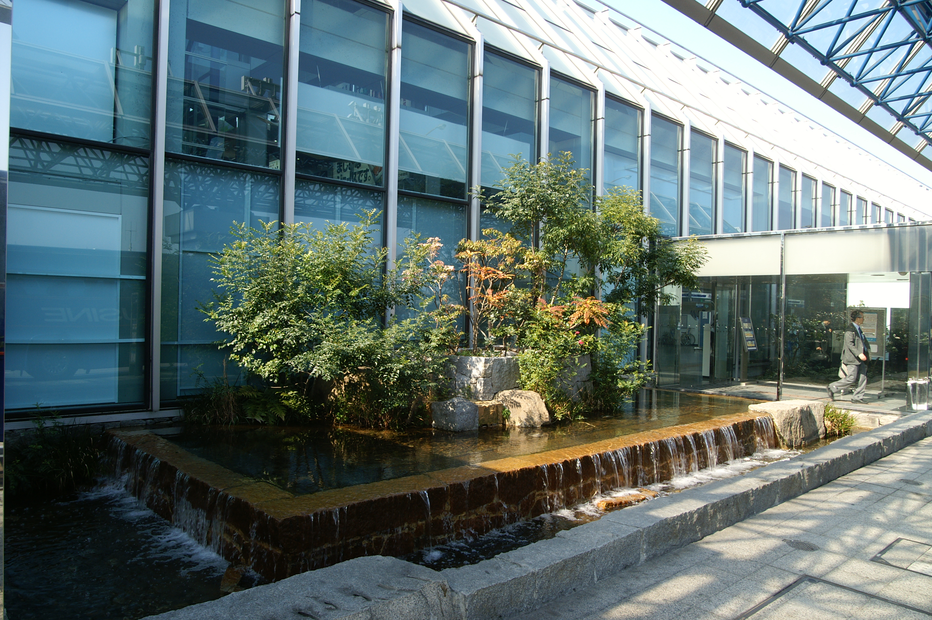 (2007/03/04 Matsuyama Airport, Matsuyama, Ehime, JAPAN)